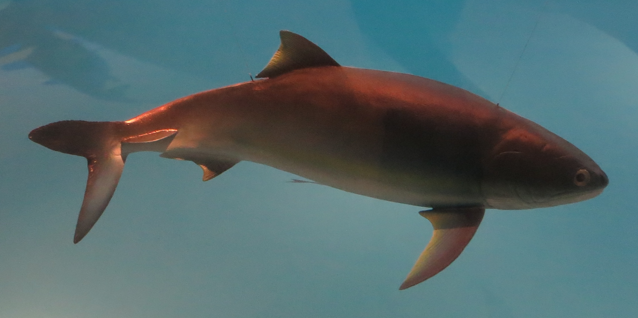 Model of Saurostomus - Took the picture at Museum am Lowentor, Stuttgart.